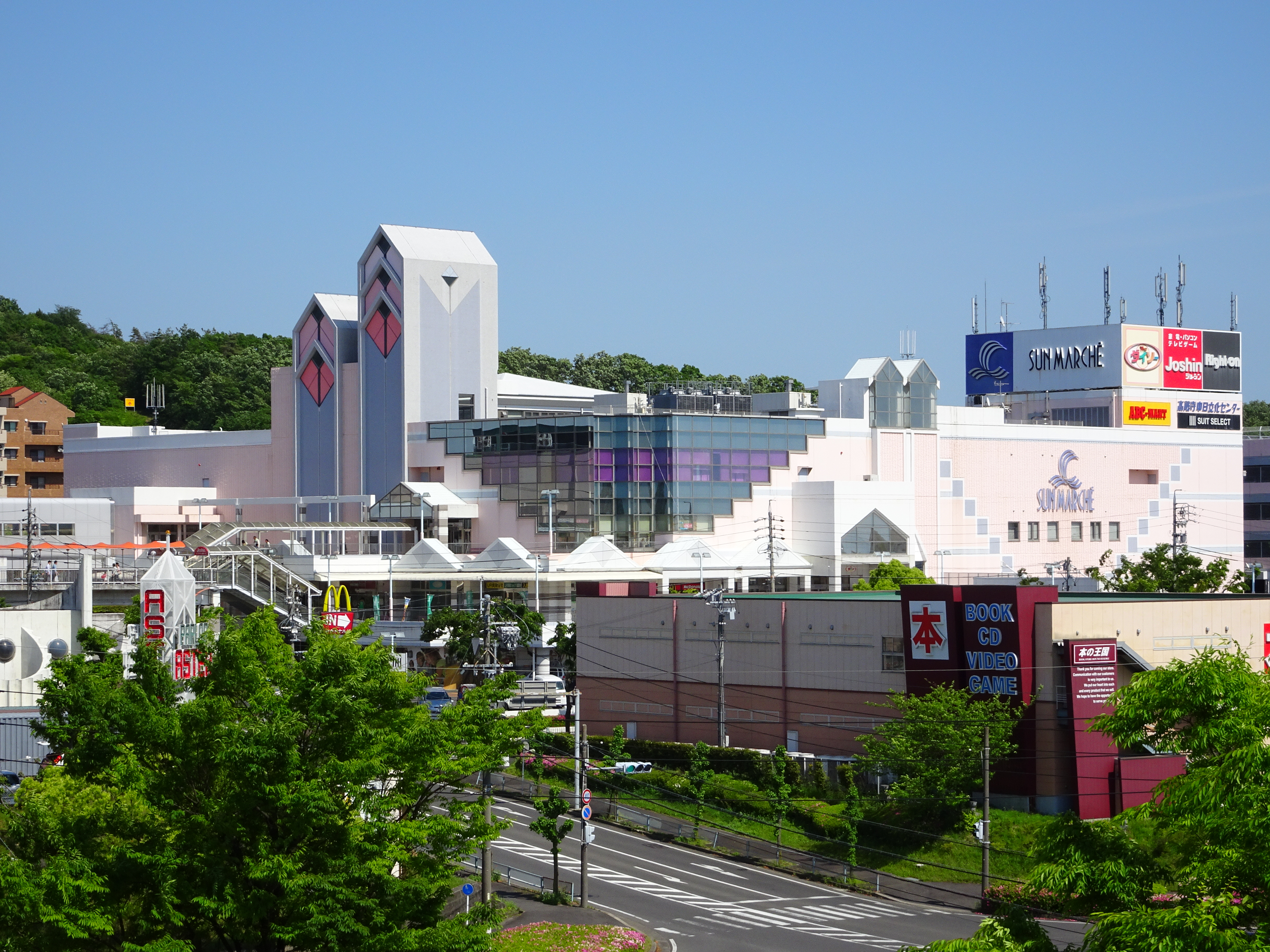 サンマルシェ南館